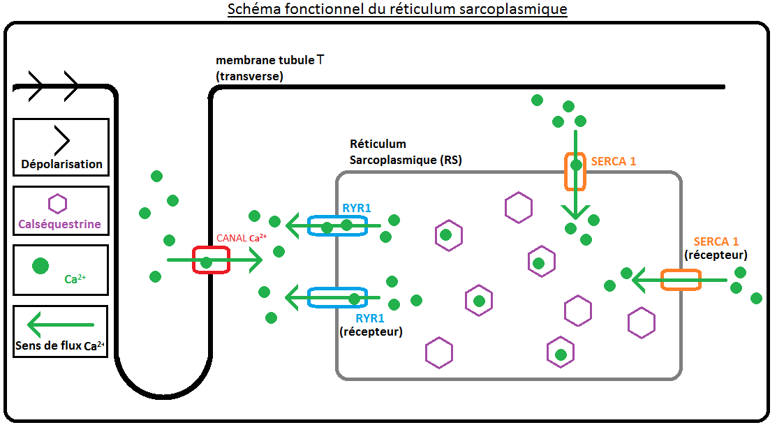 La dépolarisation du tubule T enclenche l'ouverture de canaux calciques. L'entrée de calcium dans le sarcoplasme entraîne la libération de calcium par le RS sur les myofibrilles, déclenchant la contraction musculaire.